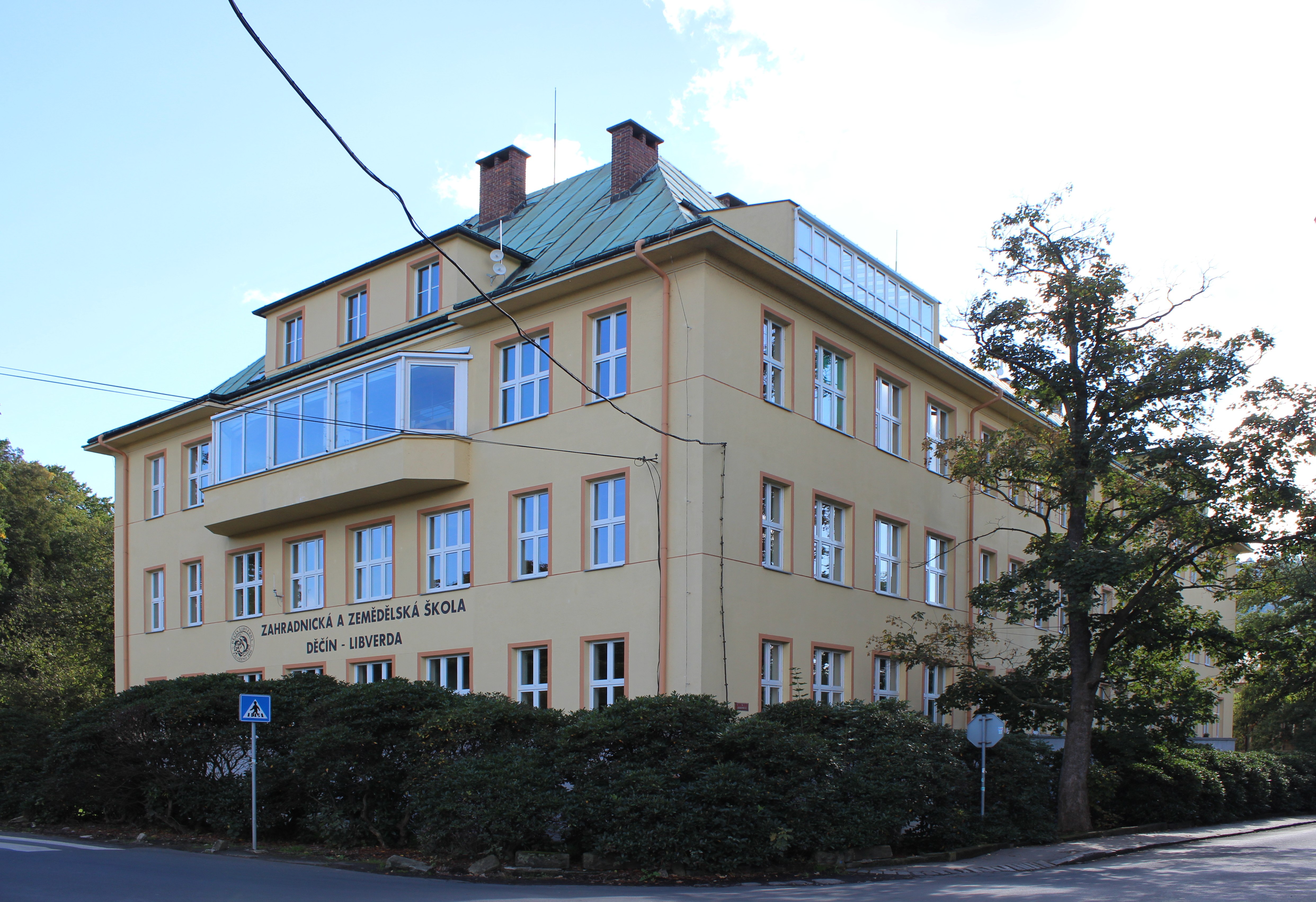 Ústřední objekt Střední zahradnické školy v děčínské Libverdě (nároží ulic Krokovy (vpravo) a Benešovské (vlevo)).